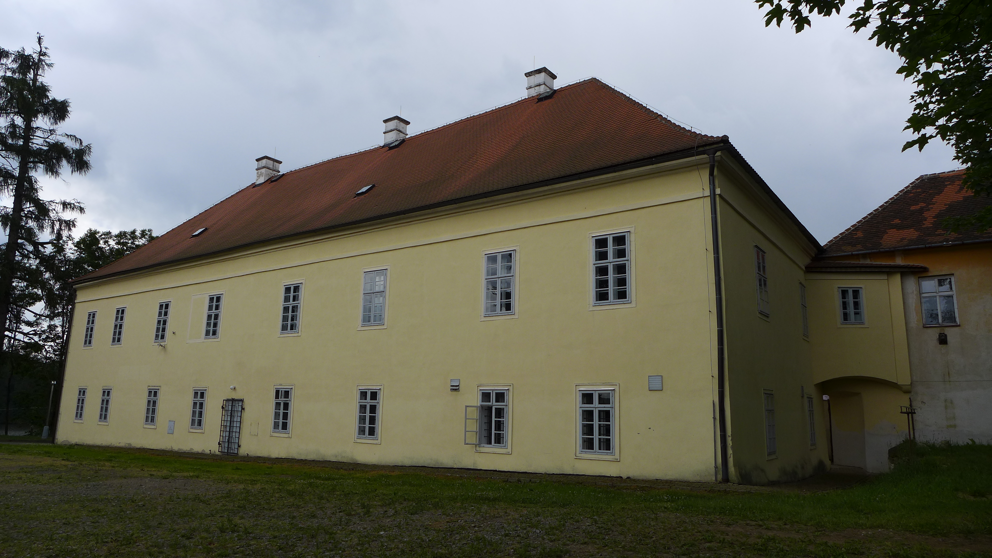 Zámek Kněžice, Kněžice 1, při silnici do Opatova, Kněžice (okres Jihlava).